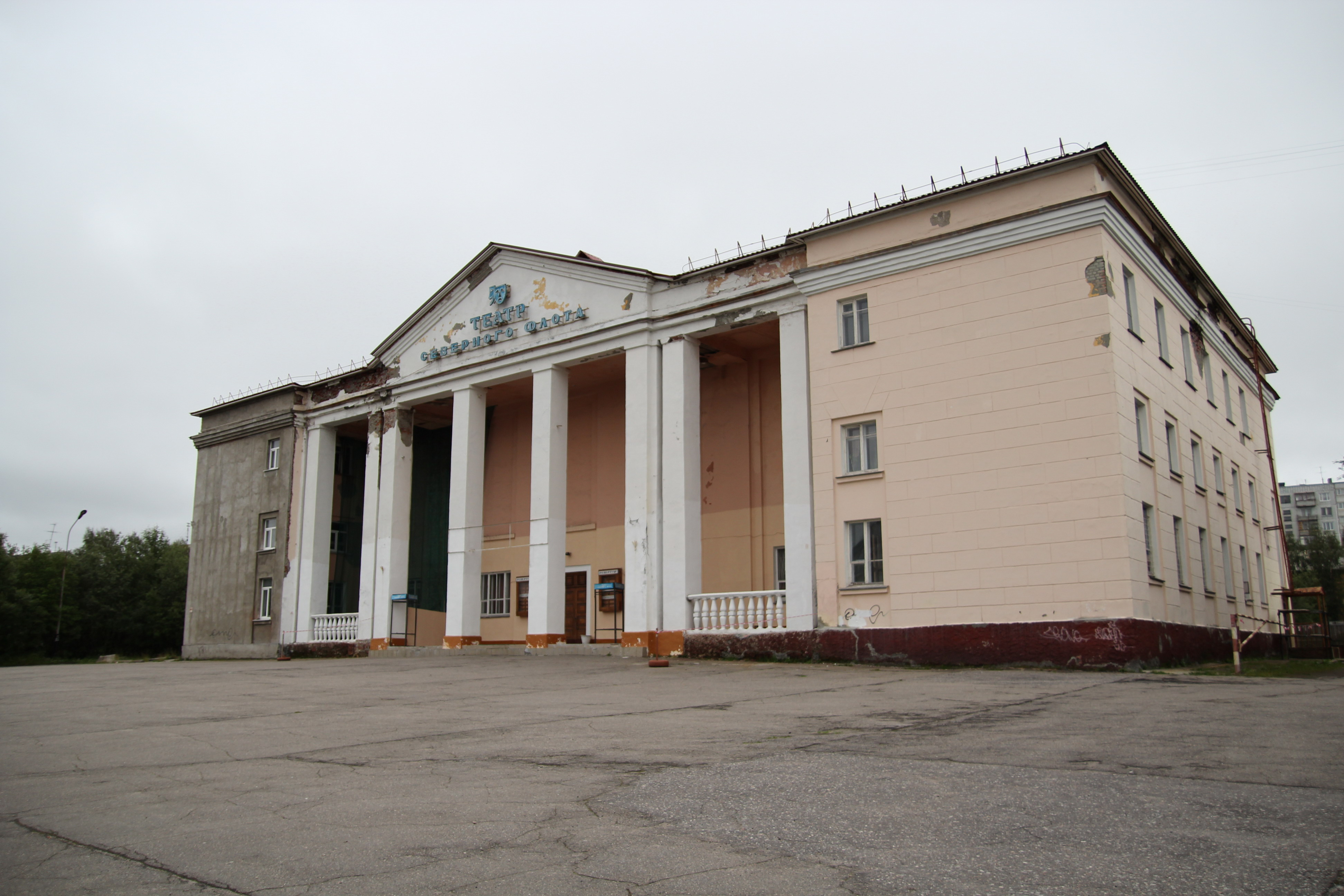 Театр Северного флота